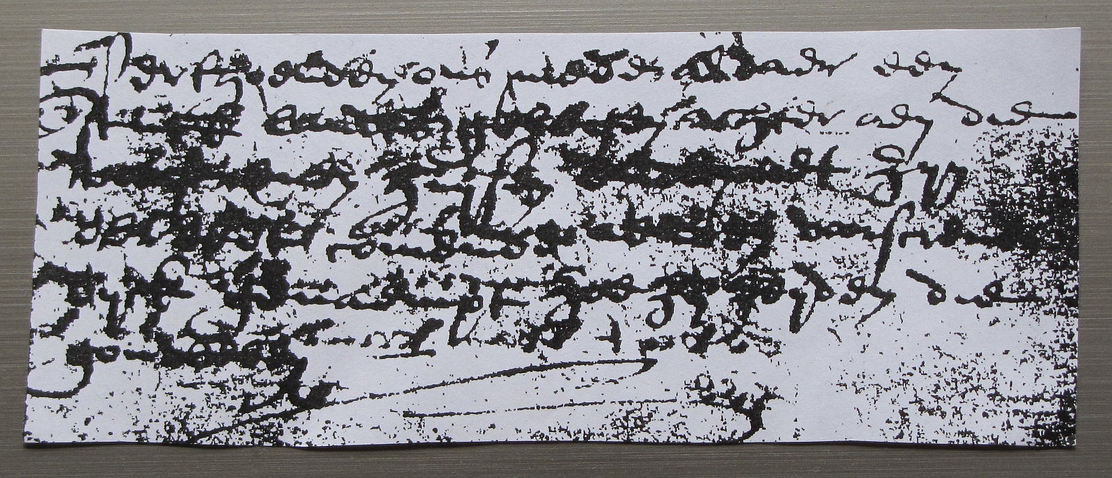 Teskt uit manuscript van Jacob van Quesnoy en Jehan Purtyck (1567)